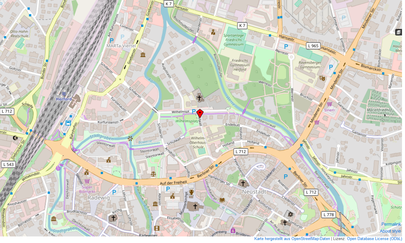 Standort der Bürgerschule Wilhelmsplatz in Herford